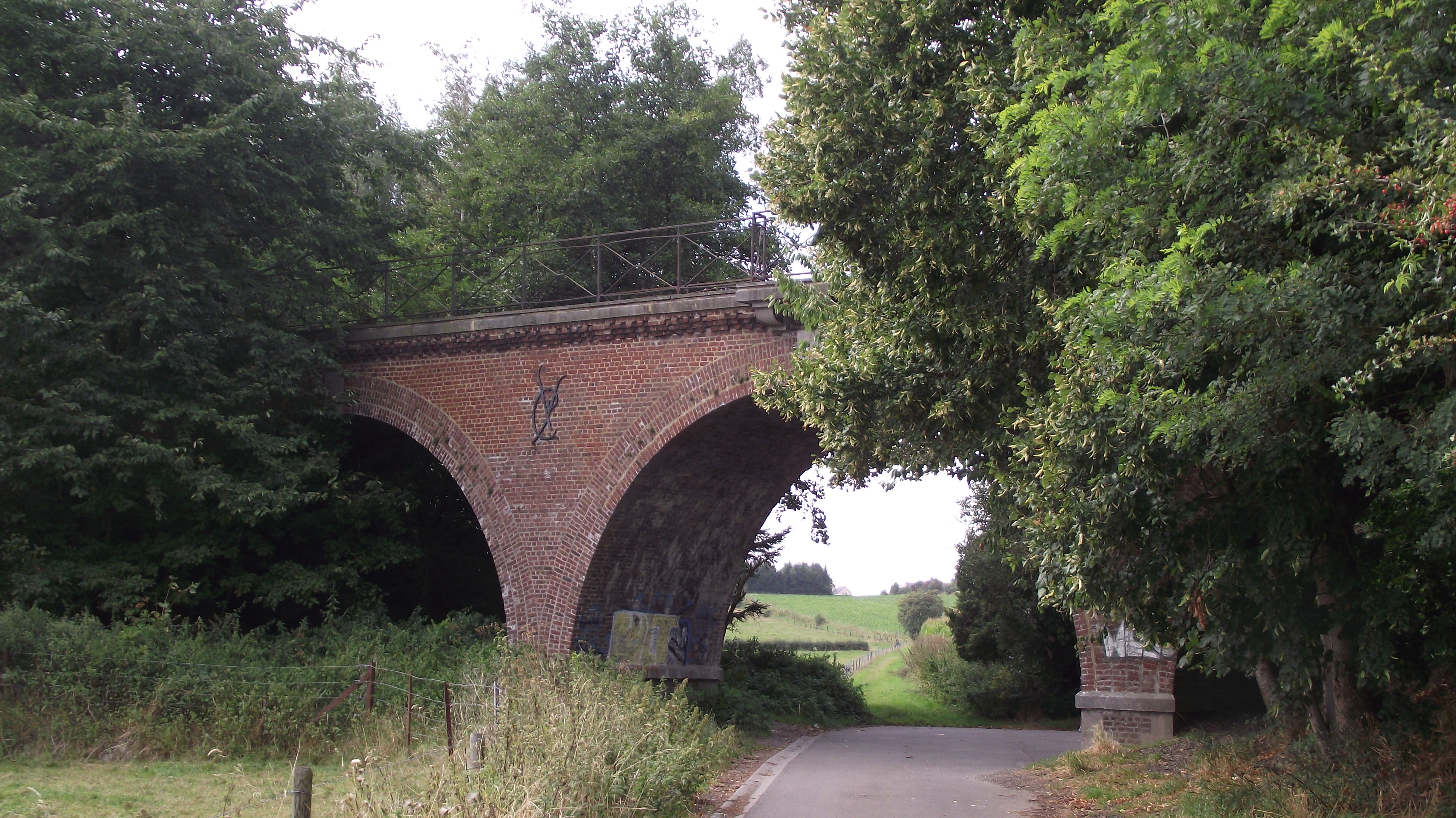 Vroegere buurtspoorbrug gezien vanaf het zuiden.